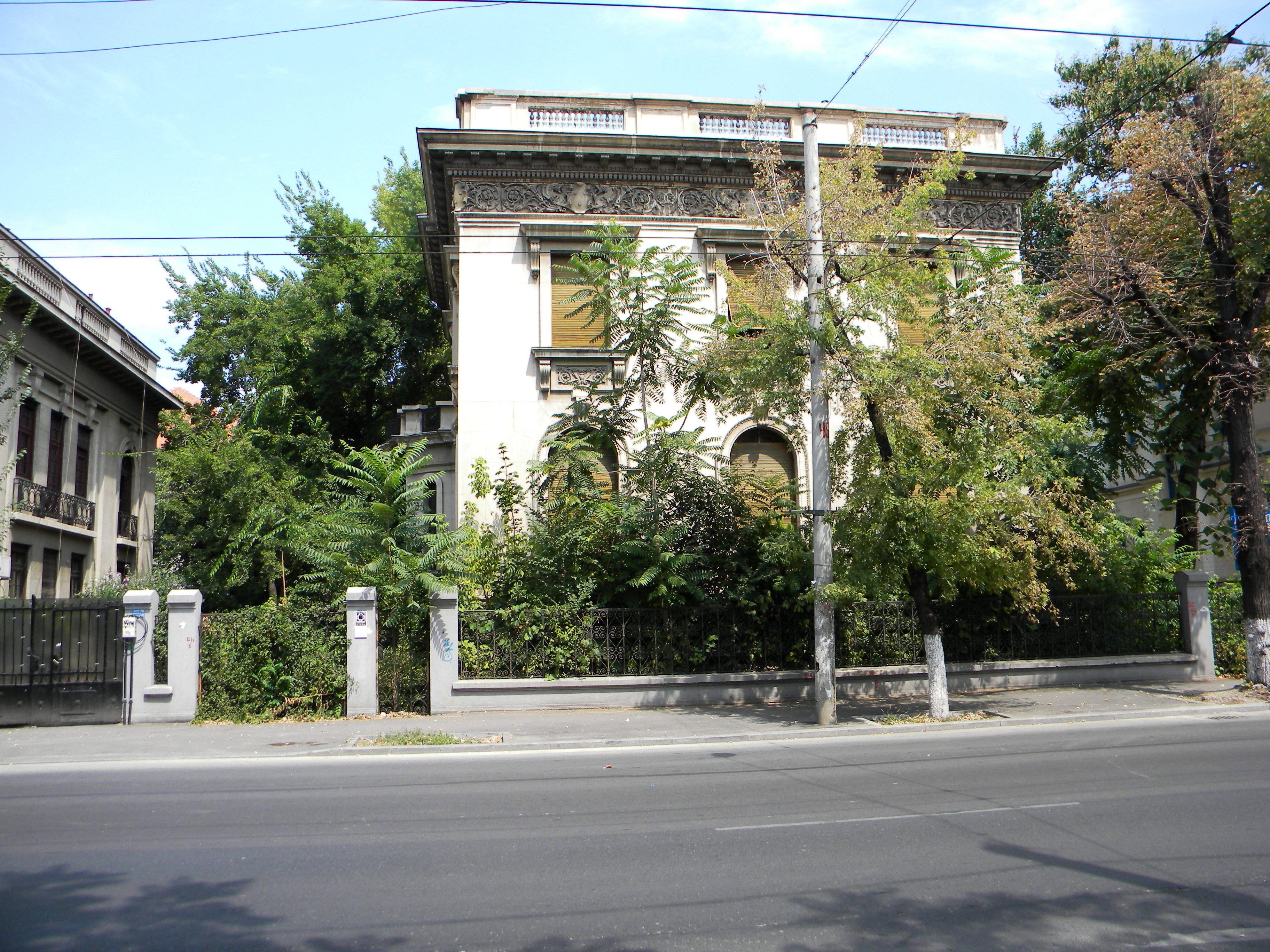 Casa pe Bd. Dacia nr. 75, Bucuresti, sect. 1